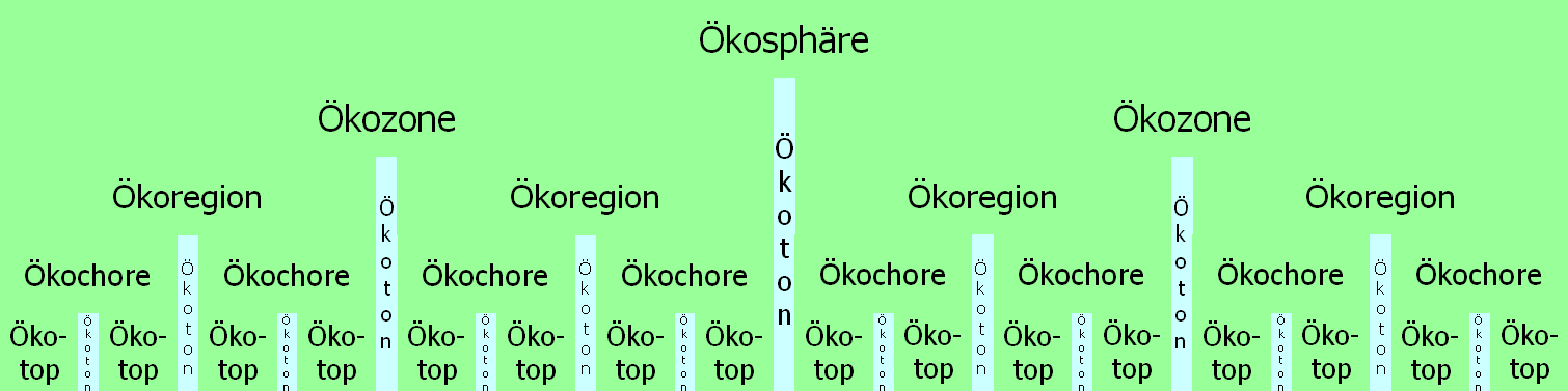 Bauprinzip der Ökosphäre, stark vereinfacht: Ökotope bilden mit ähnlichen Nachbar-Ökotopen gemeinsame Ökochoren. Ökochoren bilden mit ähnlichen Nachbar-Ökochoren gemeinsame Ökoregionen. Ökoregionen bilden mit ähnlichen Nachbar-Ökoregionen gemeinsame Ökozonen. Alle Ökozonen bilden gemeinsam die Ökosphäre. Ökoton: Ein Übergangs- oder Saumökotop zwischen zwei Ökotopen etc. Ökotop ist synonym zu Biotop. Ökochore ist synonym zu Ökotop-Gefüge. Ökozone ist synonym zu Biom. Terrestrische Ökozonen sind synonym zu Geozonen / Vegetationszonen. Ökosphäre ist synonym zu Biosphäre. Für die irdische Biosphäre werden vierzehn terrestrische Biome (mit insgesamt 867 Ökoregionen) unterschieden. Dazu treten zwölf Biome des Süßwassers und elf Biome der Meere: Olson DM, Dinerstein E, Wikramanayake E, Burgess N, Powell G, Underwood EC, d’Amico J, Itoua I, Strand H, Morrison J, Loucks C, Allnutt T, Ricketts TH, Kura Y, Wettengel W, Kassem K: Terrestrial Ecoregions of the World: A New Map of Life on Earth. In: BioScience 51 (2001): 933-938 Abell R, Thieme ML, Revenga C, Bryer M, Kottelat M, Bogutskaya N, Coad B, Mandrak N, Contreras Balderas S, Bussing W, Stiassny MLJ, Skelton P, Allen GR, Unmack P, Naseka A, Ng R, Sindorf N, Robertson J, Armijo E, Higgins JV, Heibel TJ, Wikramanayake E, Olson D, López HL, Reis RE, Lundberg JG, Sabaj Pérez MH, Petry P: Freshwater Ecoregions of the World: A New Map of Biogeographic Units for Freshwater Biodiversity Conservation. In: BioScience 58 (2008): 403-414 Spalding MD, Fox HE, Allen GR, Davidson N, Ferdana ZA, Finlayson M, Halpern BS, Jorge MA, Lombana A, Lourie SA, Martin KD, McManus E, Molnar J, Recchia CA, Robertson J: Marine Ecoregions of the World: A Bioregionalization of Coastal and Shelf Areas. In: BioScience 57 (2007): 573-583